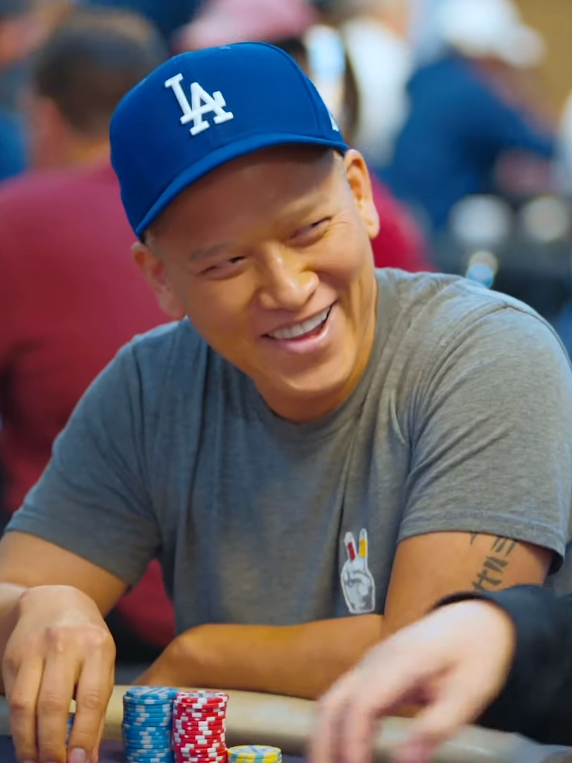 Tuan Le beim WPT Legends of Poker